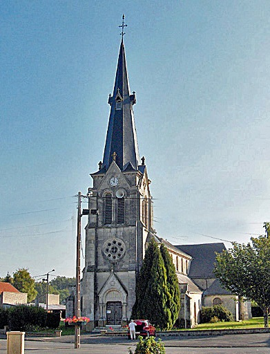 Blanzy la Salonnaise, église vue du parvis